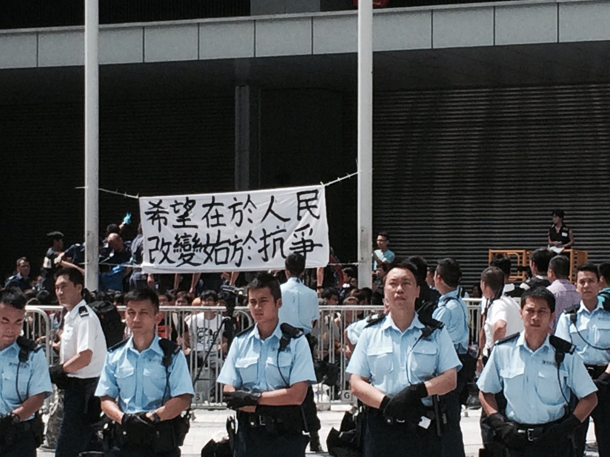 香港警方在公民廣場進行清場行動，拘捕多名學生領袖